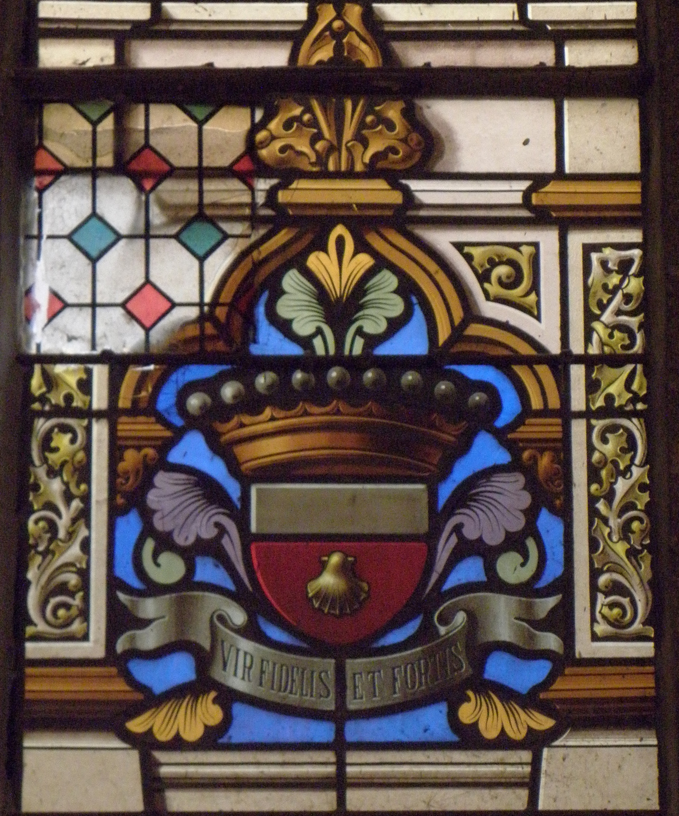 Intérieur de l'église Saint-Pierre de Trans-la-Forêt (35). Baie n°00. Détail. Amoiries de la famille Artur de la Villarmois (De gueules à la coquille d'or au chef d'argent).